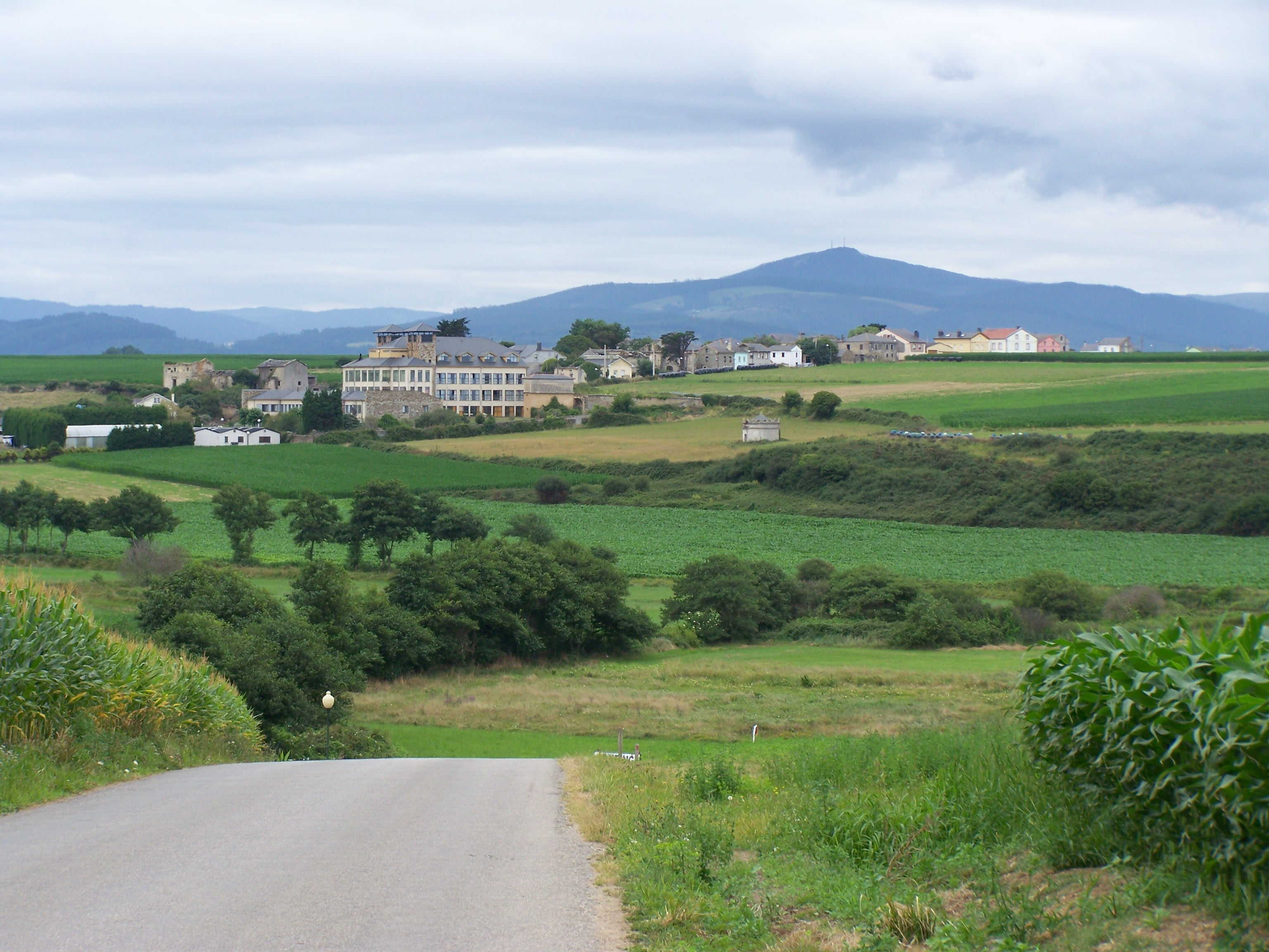 Villaamil